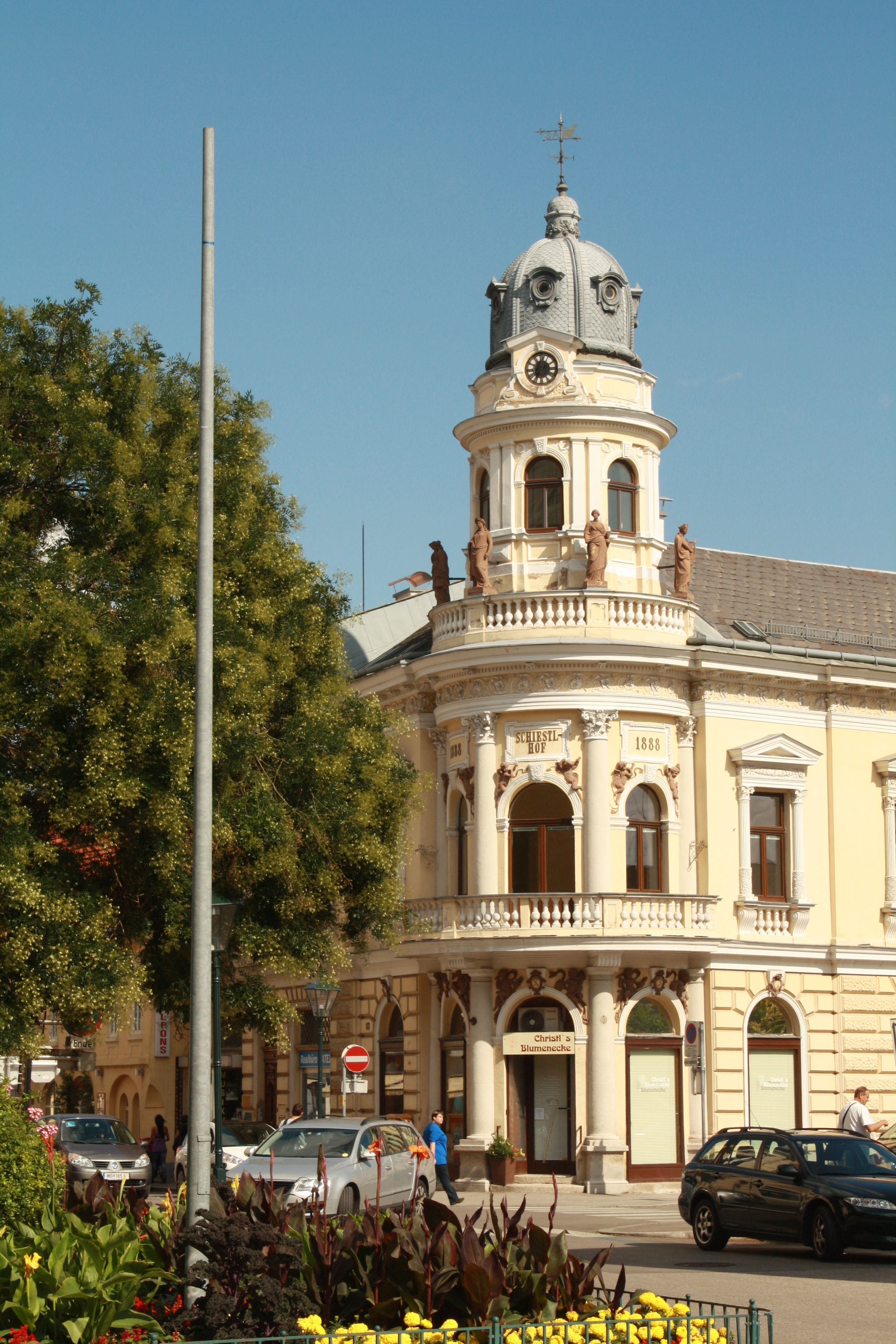 Schiestlhof in Baden, Antonsgasse 2, nicht denkmalgeschützt